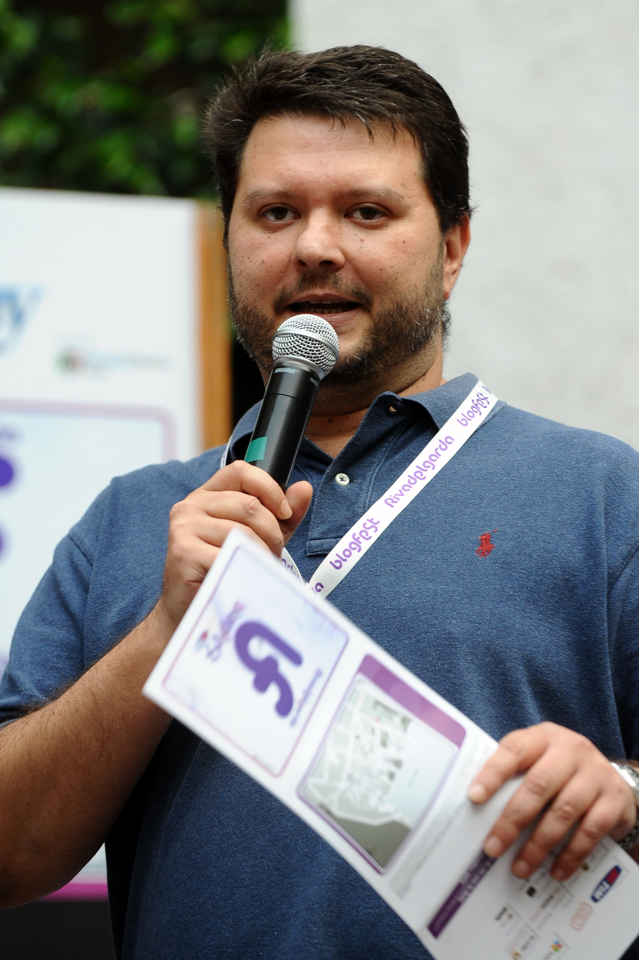 Gianluca Neri al Blogfest 2012 a Riva del Garda.